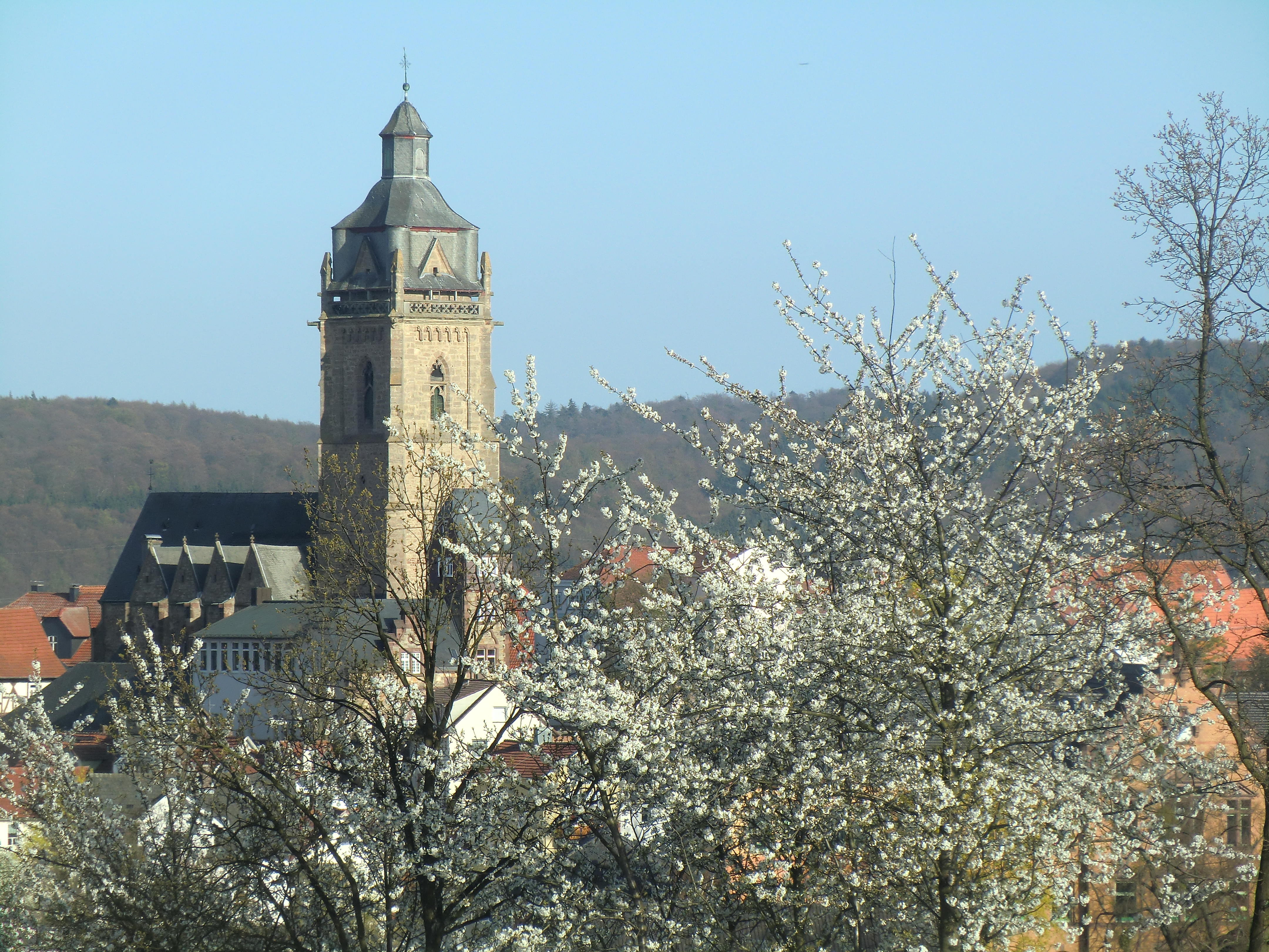 Evangelische Stadtkirche in Bad Wildungen, Hessen, Deutschland.